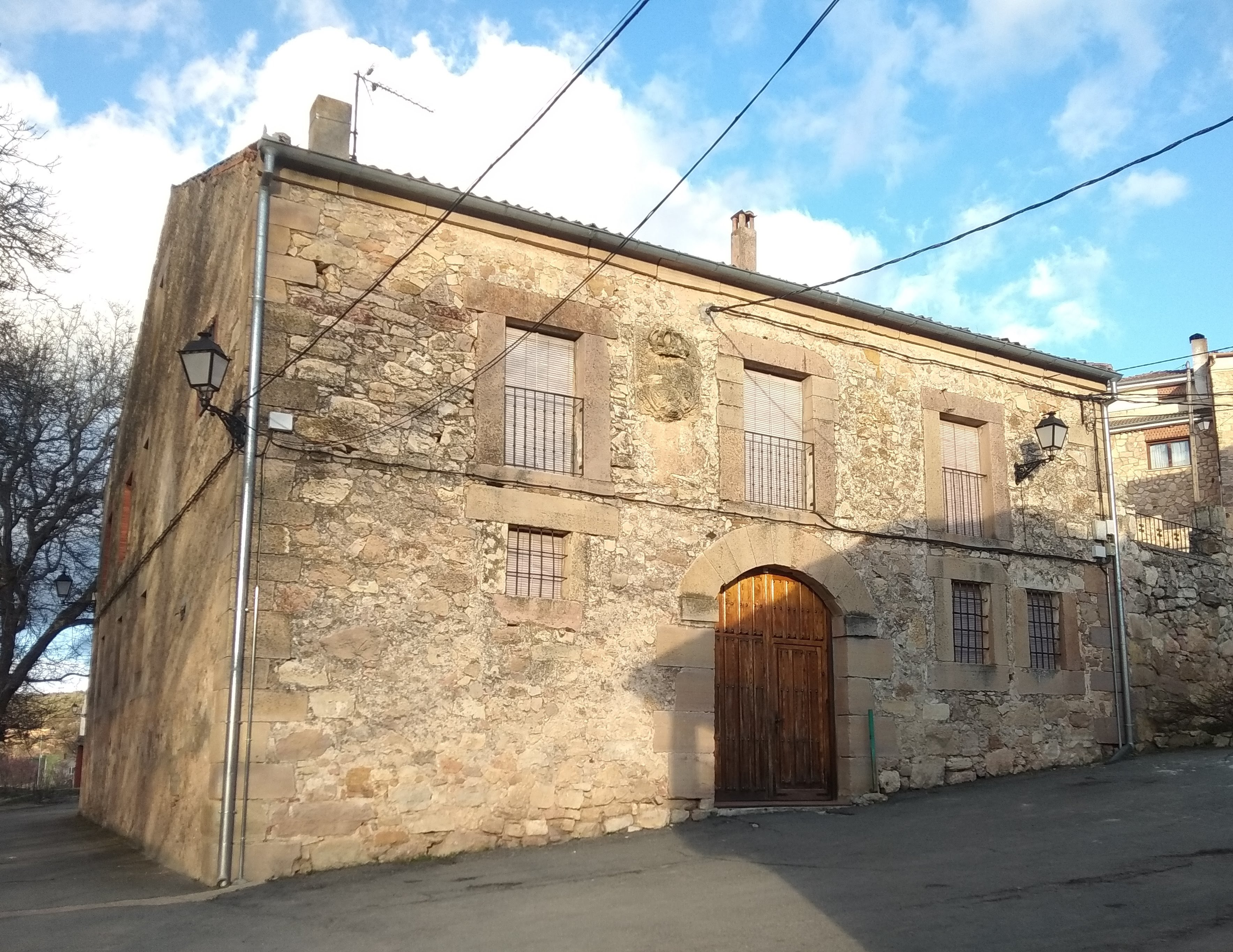 Casa Consistorial de Caballar (Segovia, España)